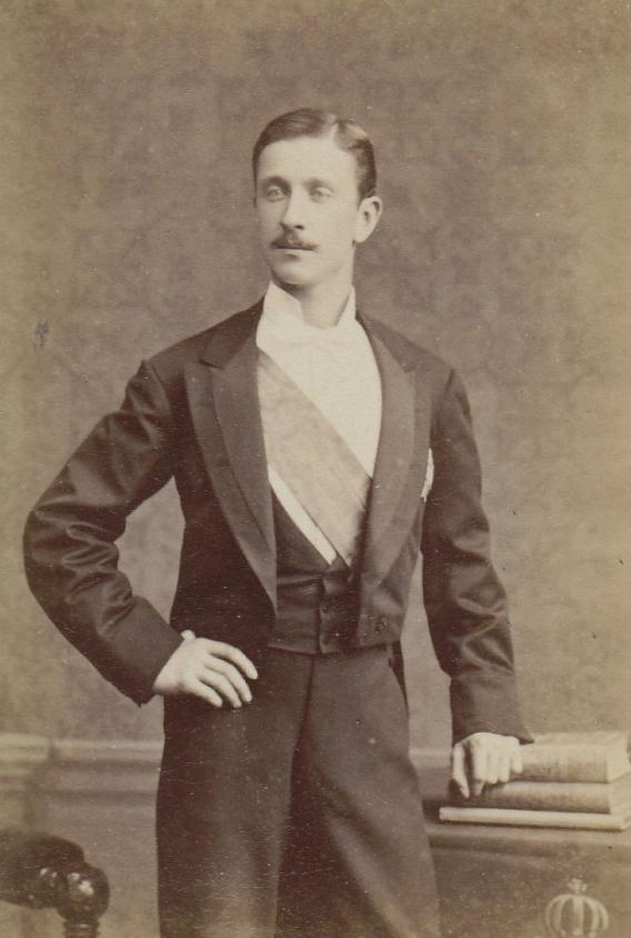 Le prince impérial en 1878.